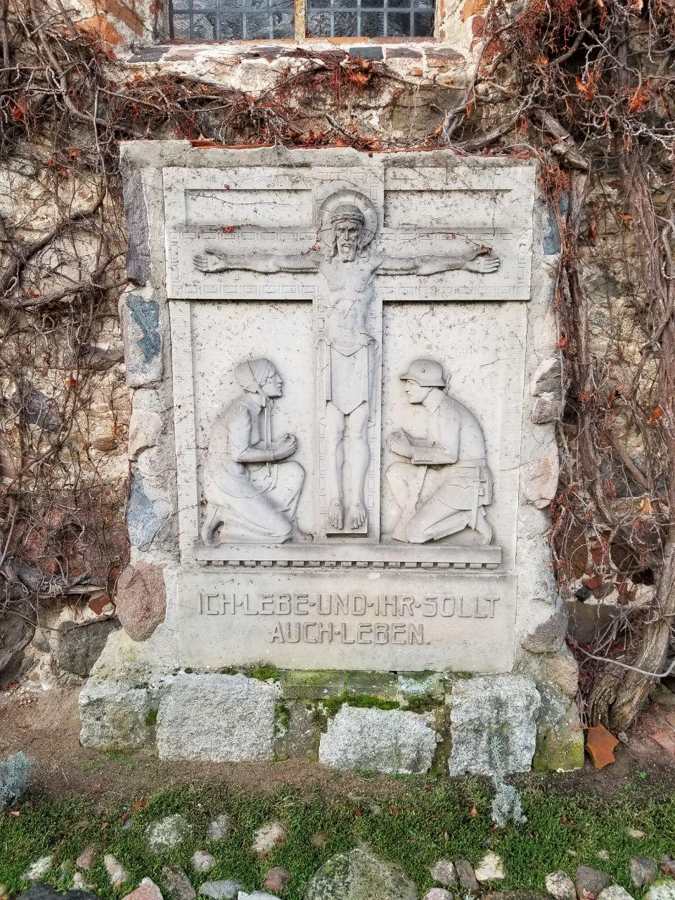 Feldsteinkirche Trebel. Die Kreuzigung Jesu